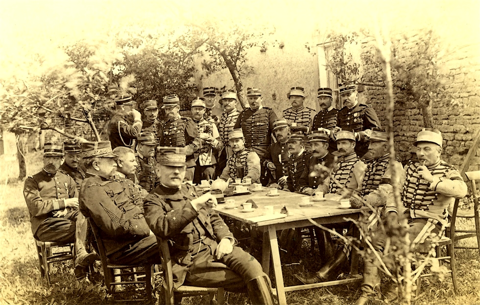 Les officiers des 4e et 5e divisions de cavalerie après les manœuvres - 1891. Photographe inconnu. Sur le site source les officiers représentés ont une notice biographique.